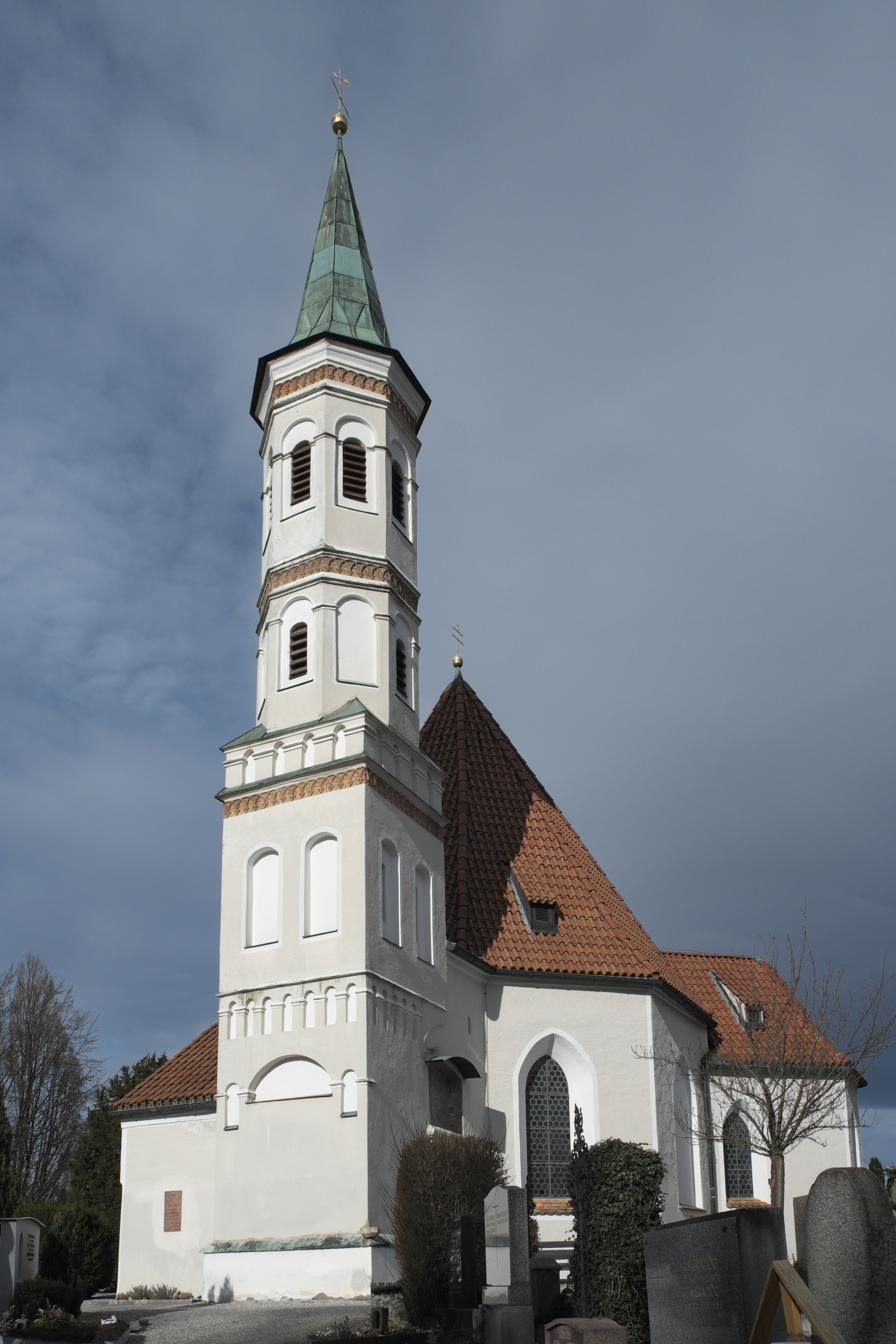 Katholische Friedhofskirche St. Salvator und Sebastian in Weilheim in Oberbayern im Landkreis Weilheim-Schongau (Bayern/Deutschland), Reliefs über dem Eingang